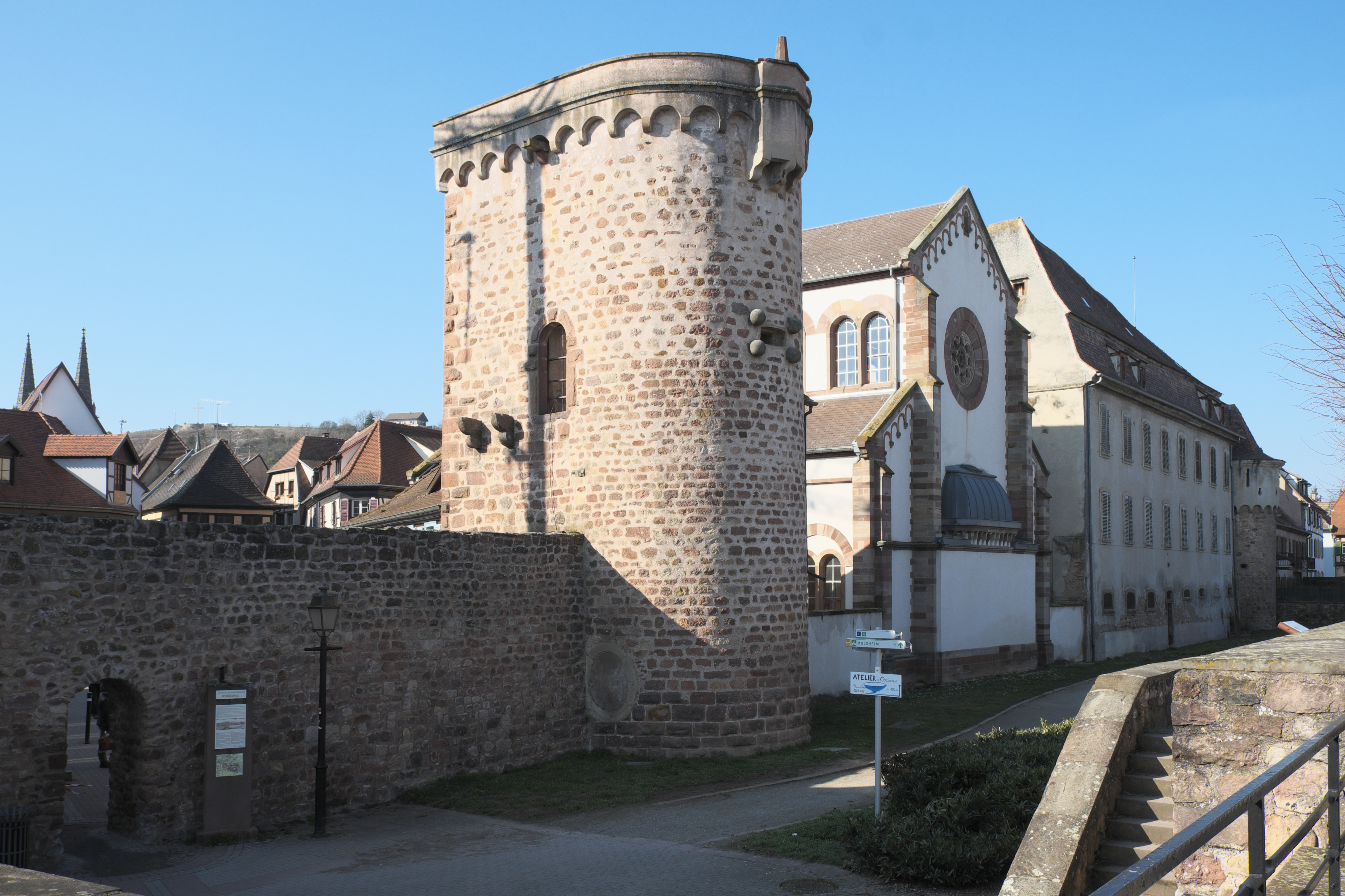 Synagoge (Obernai) in Obernai im Département Bas-Rhin in der Region Grand Est (Frankreich), mit Türmen der Stadtmauer